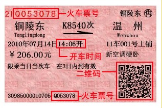 新版火车票（二维码）